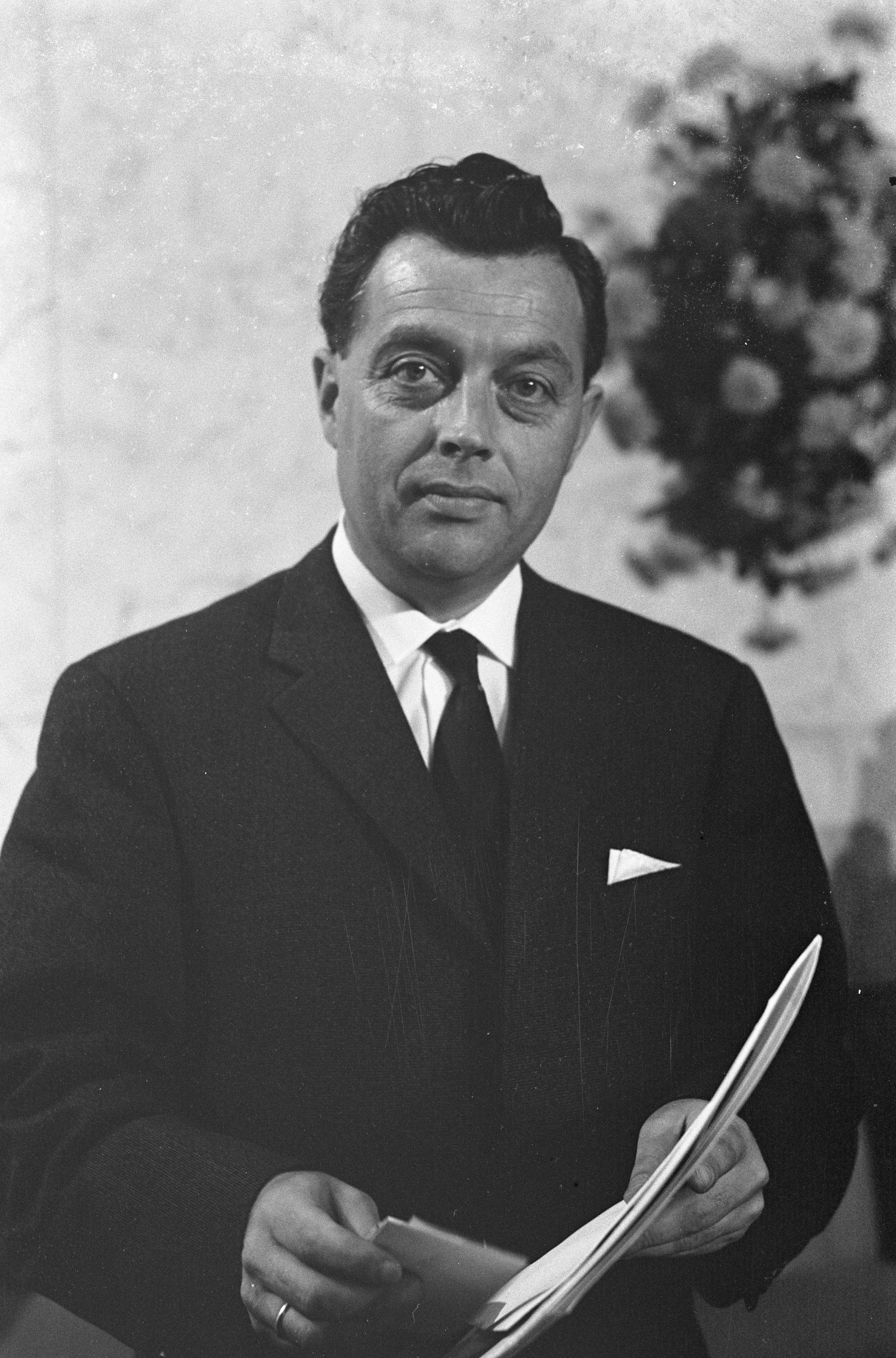 Collectie / Archief : Fotocollectie Anefo Reportage / Serie : [ onbekend ] Beschrijving : Uitreiking TV Prijs 61 aan Carel Enkelaar . Carel Enkelaar Datum : 10 oktober 1961 Trefwoorden : Uitreikingen Persoonsnaam : Enkelaar, Carel Instellingsnaam : TV Prijs '61 Fotograaf : Pot, Harry / Anefo Auteursrechthebbende : Nationaal Archief Materiaalsoort : Negatief (zwart/wit) Nummer archiefinventaris : bekijk toegang 2.24.01.05 Bestanddeelnummer : 913-0290 Reacties Geplaatst door Geschiedenismens - Televisie op 30 november 2017 - 21:08. Locatie: Hilversumse Raadhuis Plaats: Hilversum, Noord-Holland Instellingsnaam / Persoonsnaam: Prins Bernhard Fonds